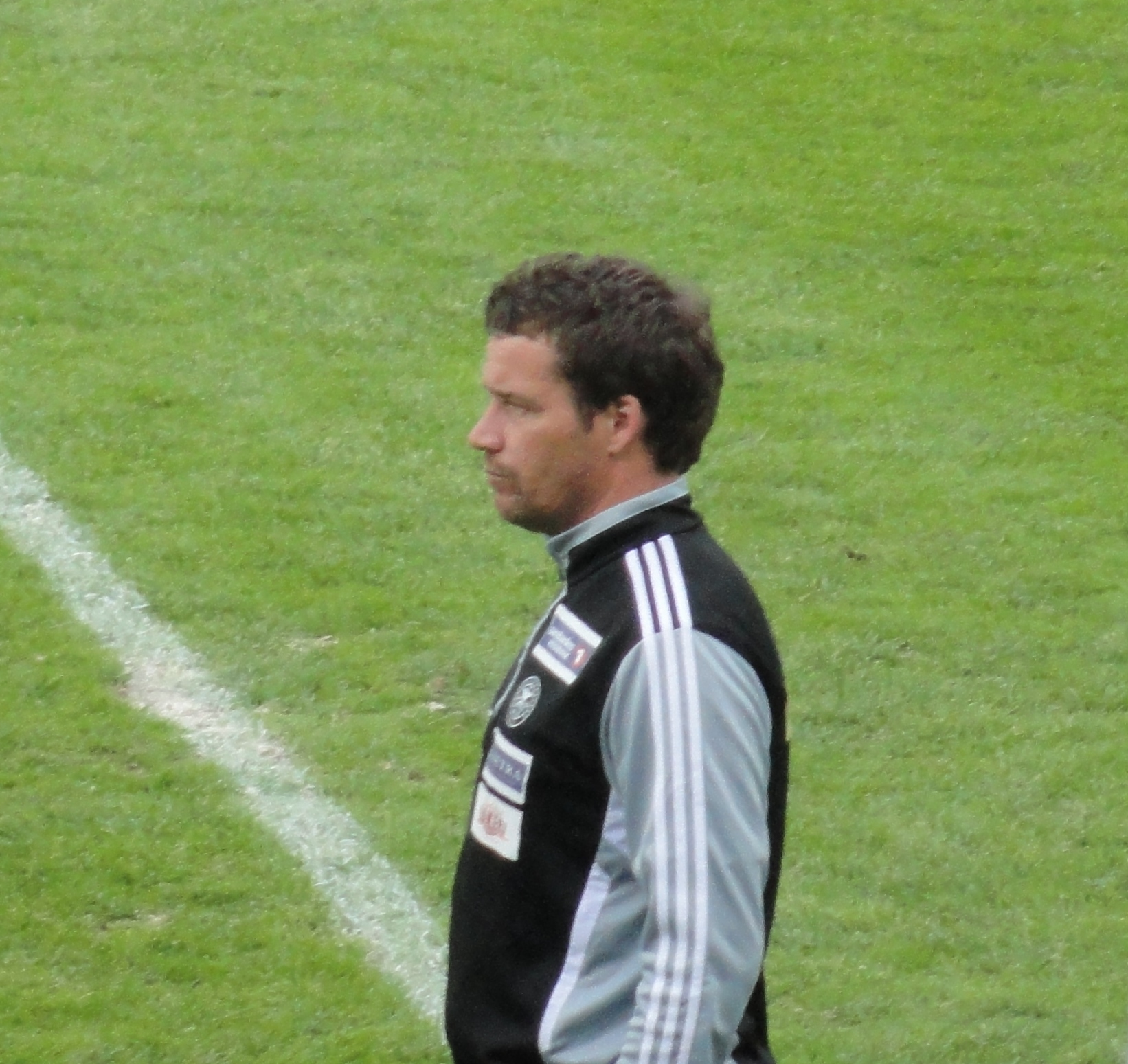 Bilde av Svein Inge Haagenrud